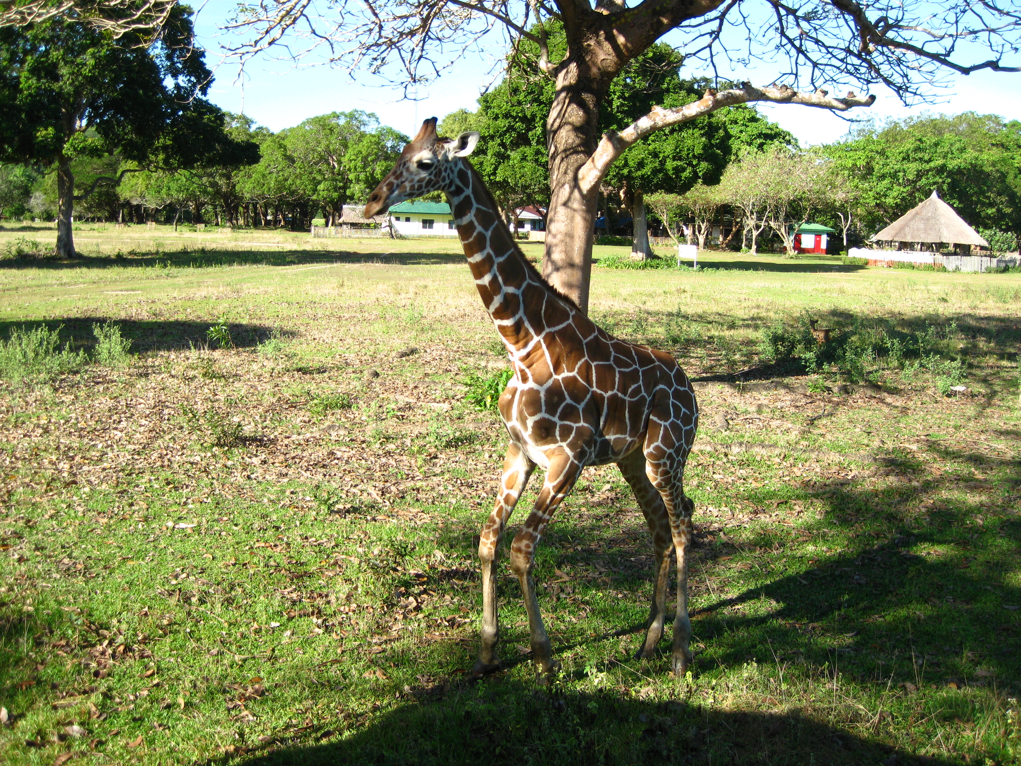 Calauit Island Safari, Palawan, Philippines